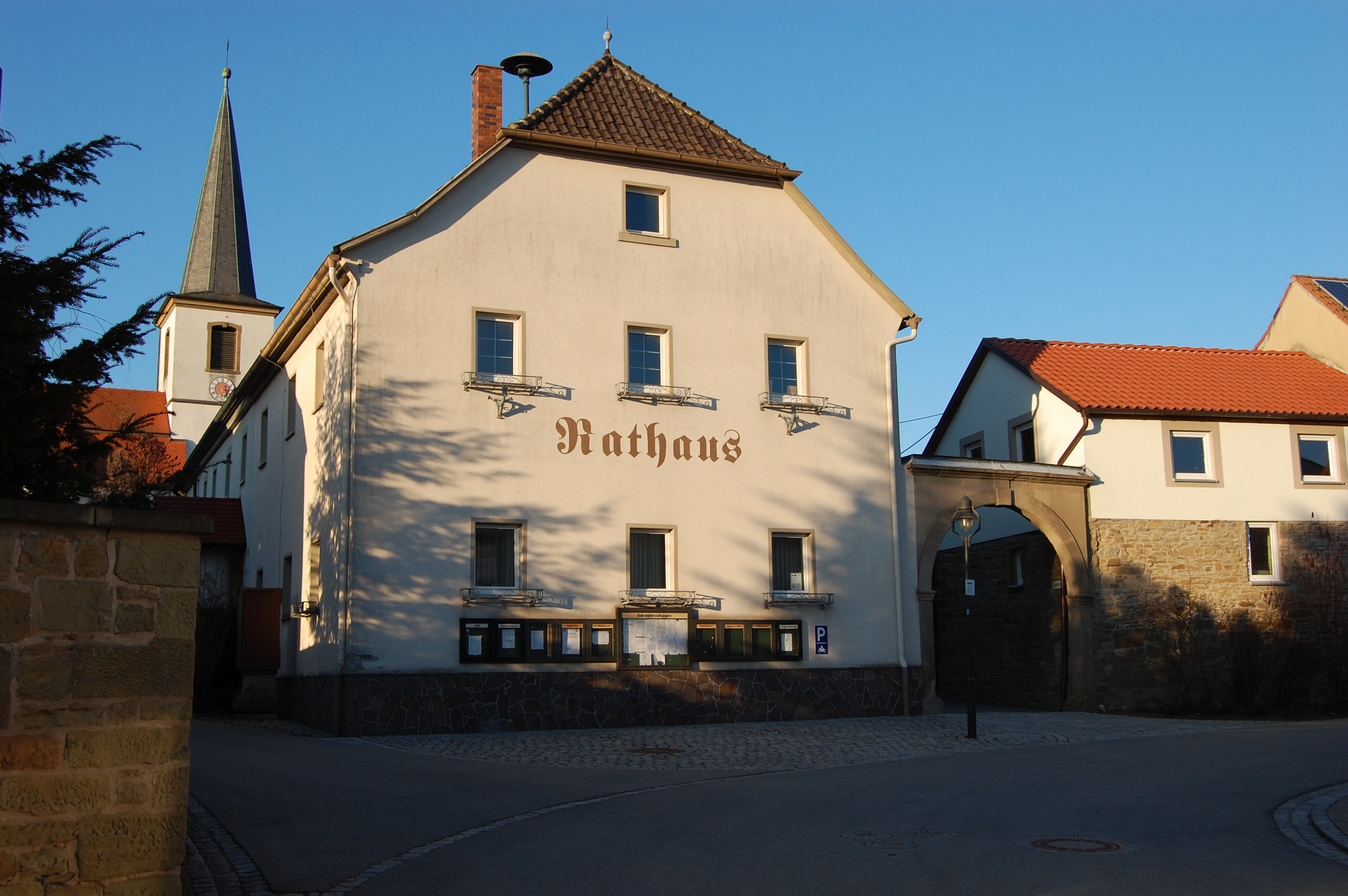 Rödelmaier, Kreis Rhön-Grabfeld (2011)